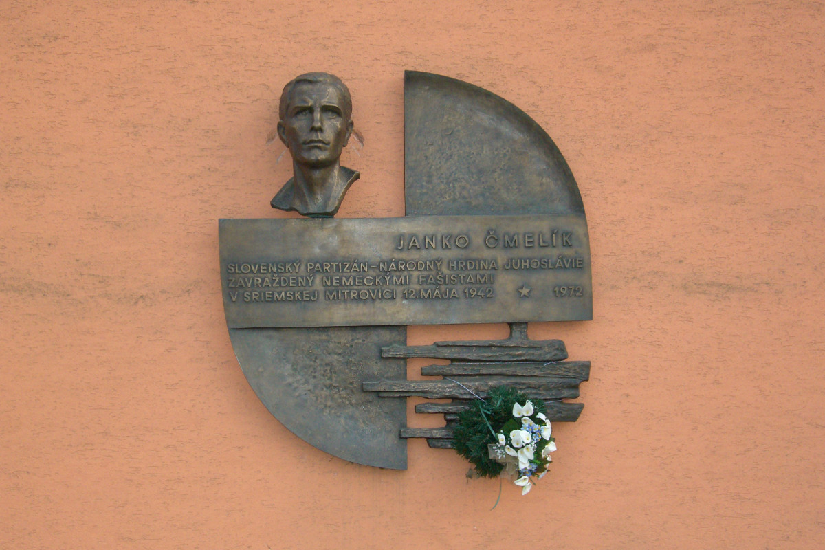 Pamatna tabula Janka Cmelika - detail, Bratislava/Ruzinov/Posen